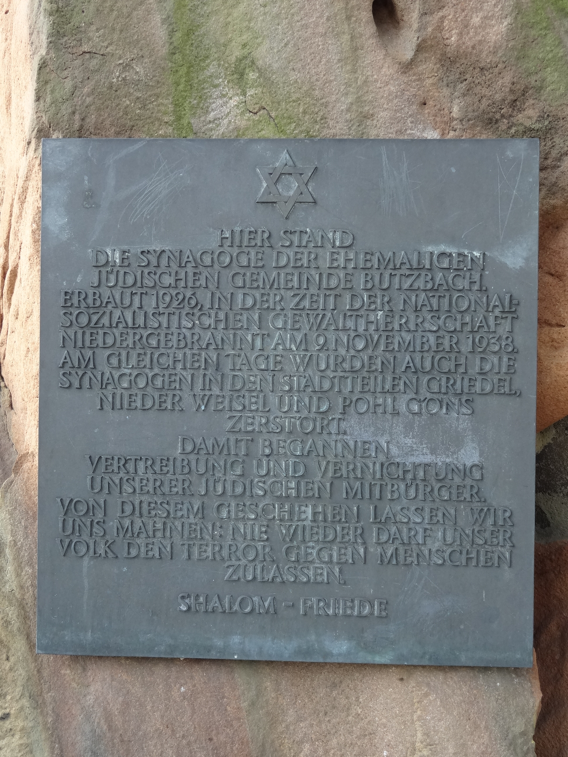 Synagogenplatz (Butzbach)